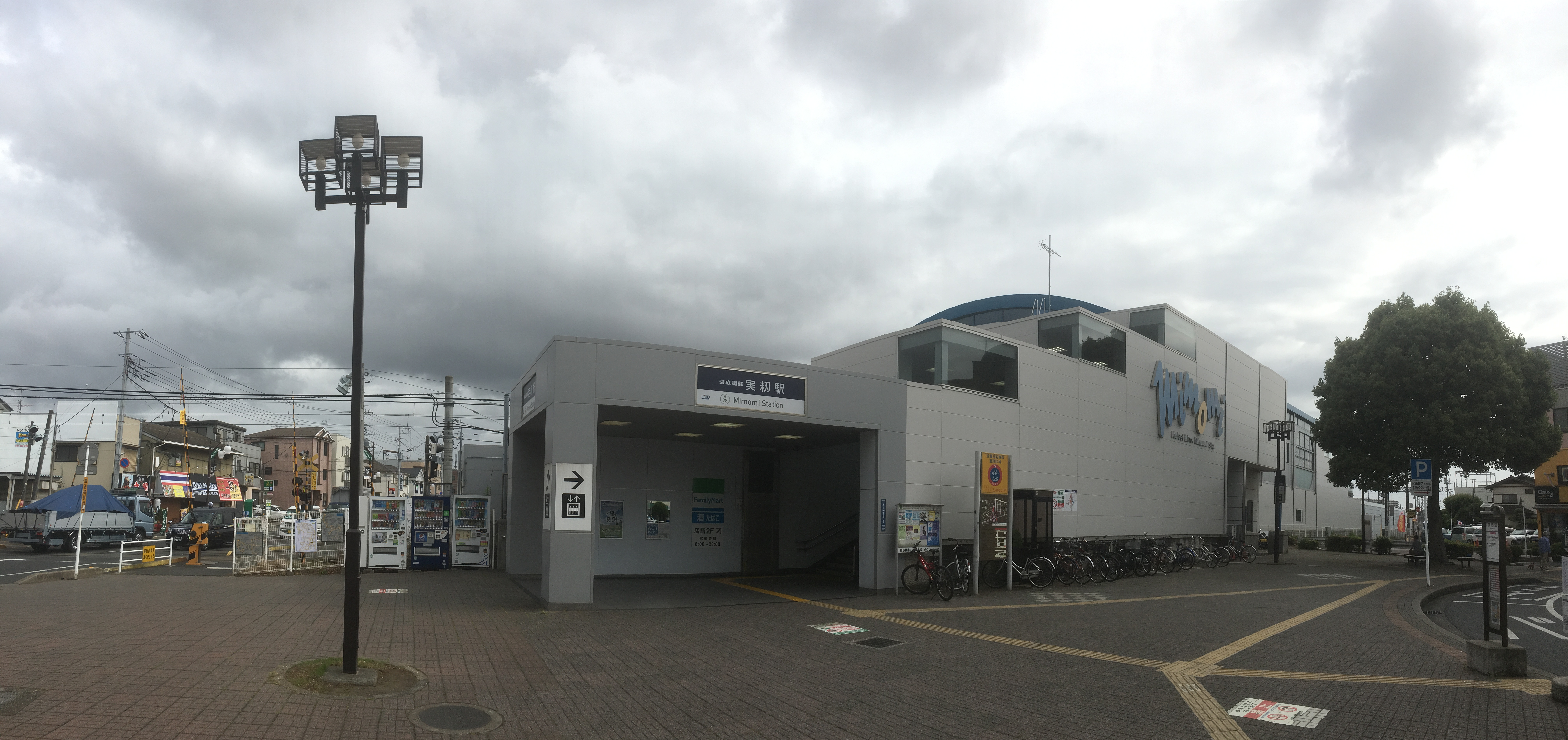 実籾駅 (Mimomi Station)